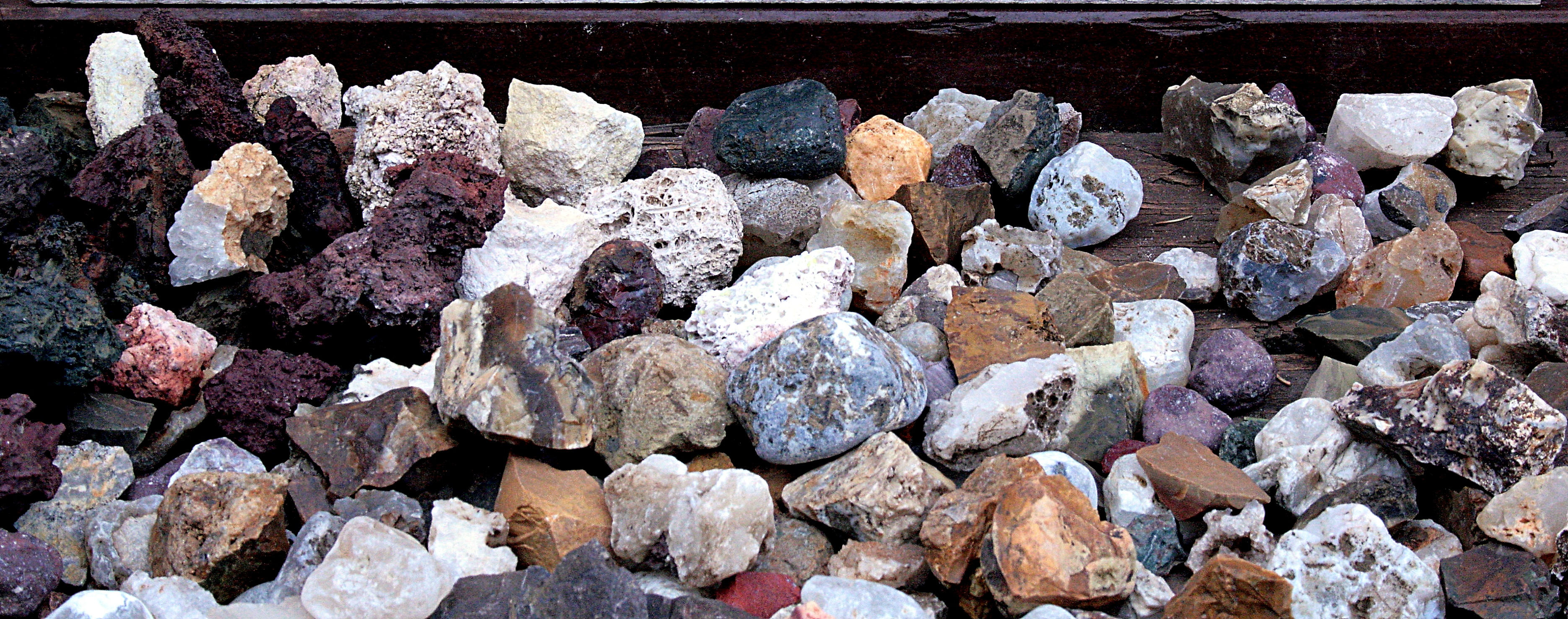 Stöðvarfjörður: Steinemuseum Petra Sveinsdóttir